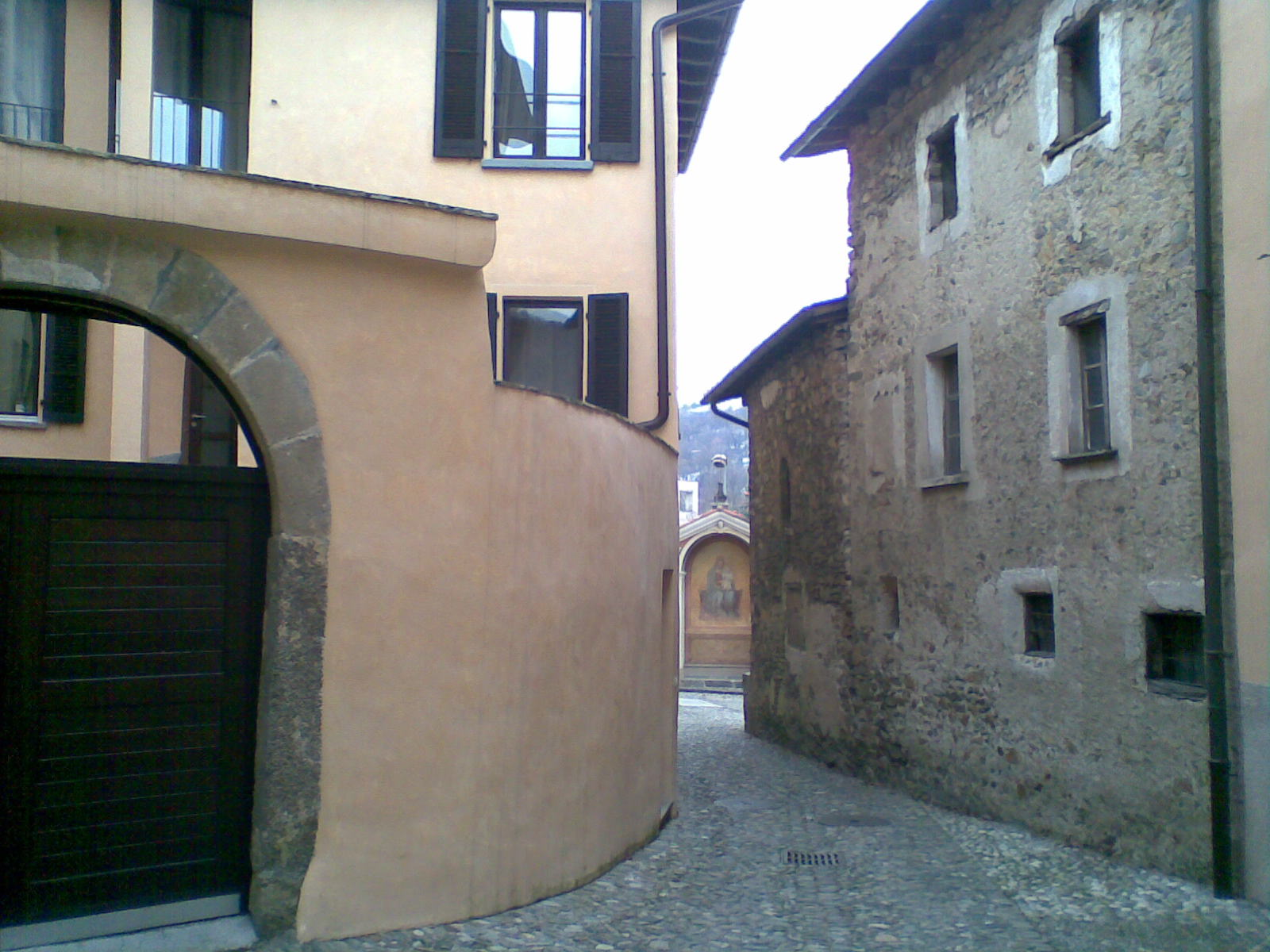 Vicolo nel paese di Origlio (CH)